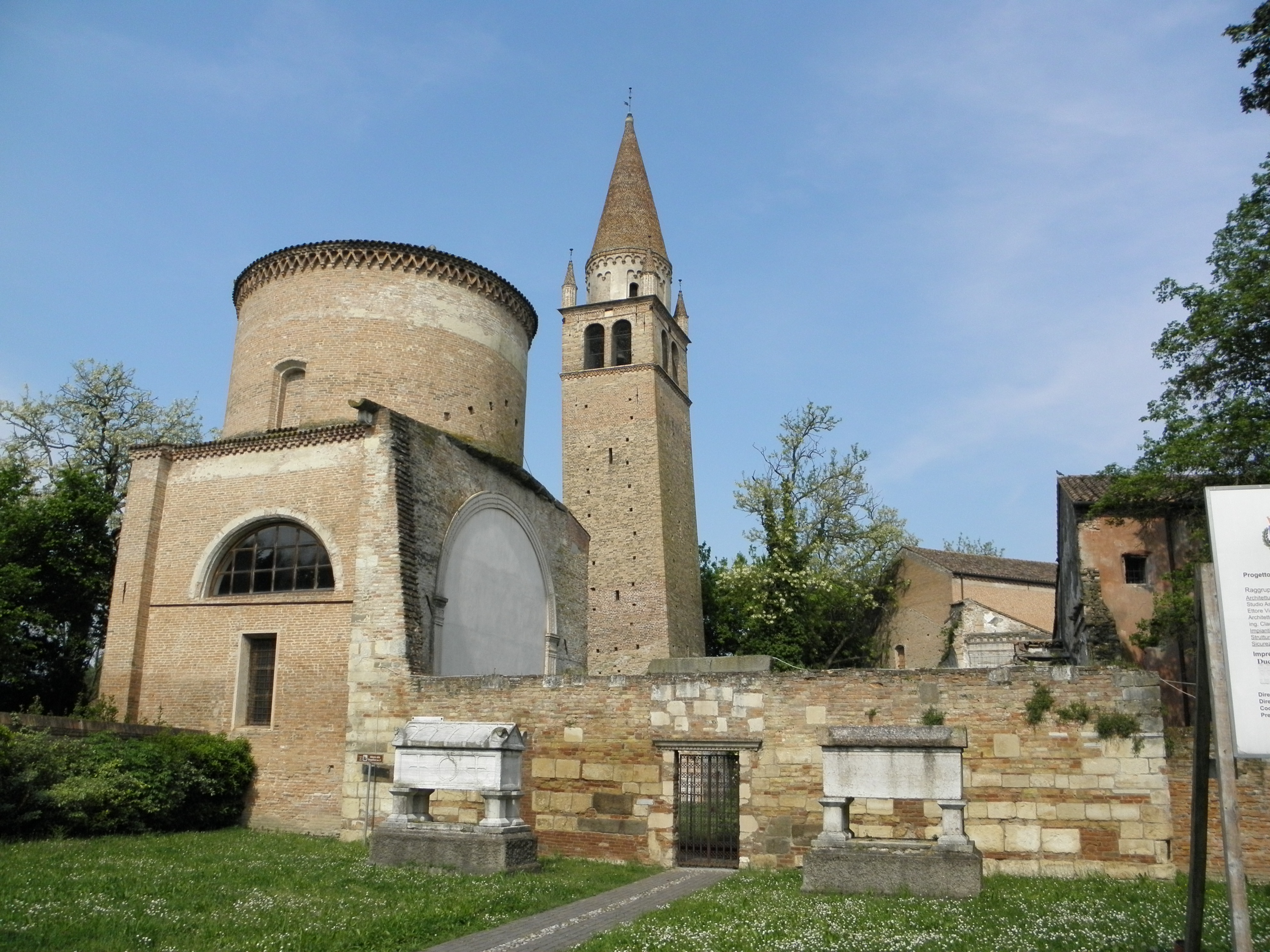 Badia Polesine: vista di quanto resta del complesso dell'abbazia della Vangadizza dal piazzale di via degli Estensi.